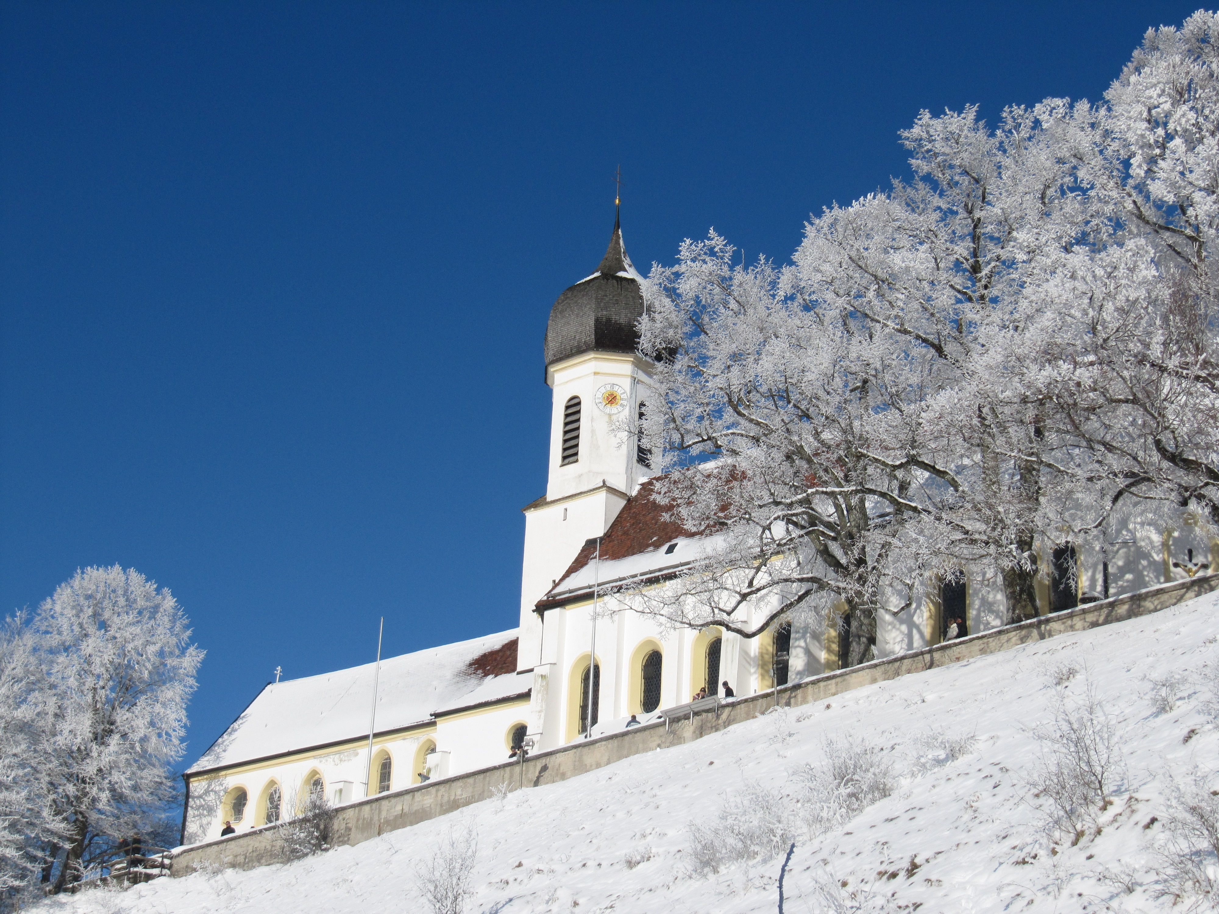 Frühere Pfarrkirche mit Wallfahrtskirche, Blick von Süd Koordinaten siehe EXIFThis is a photograph of an architectural monument.